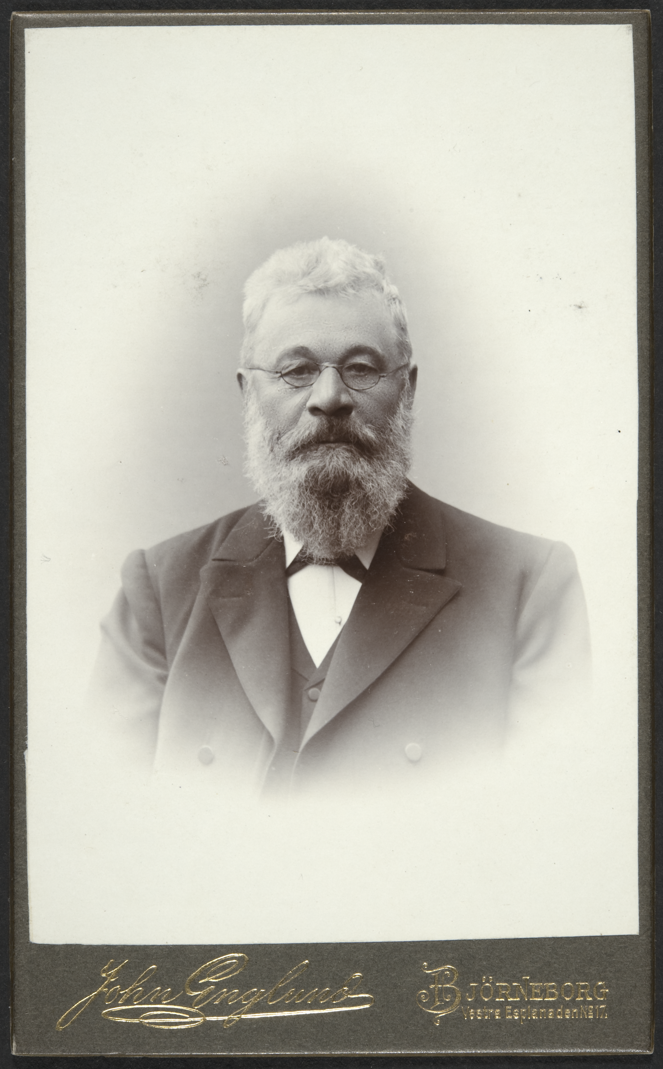 Petter Adolf Karsten before 1917